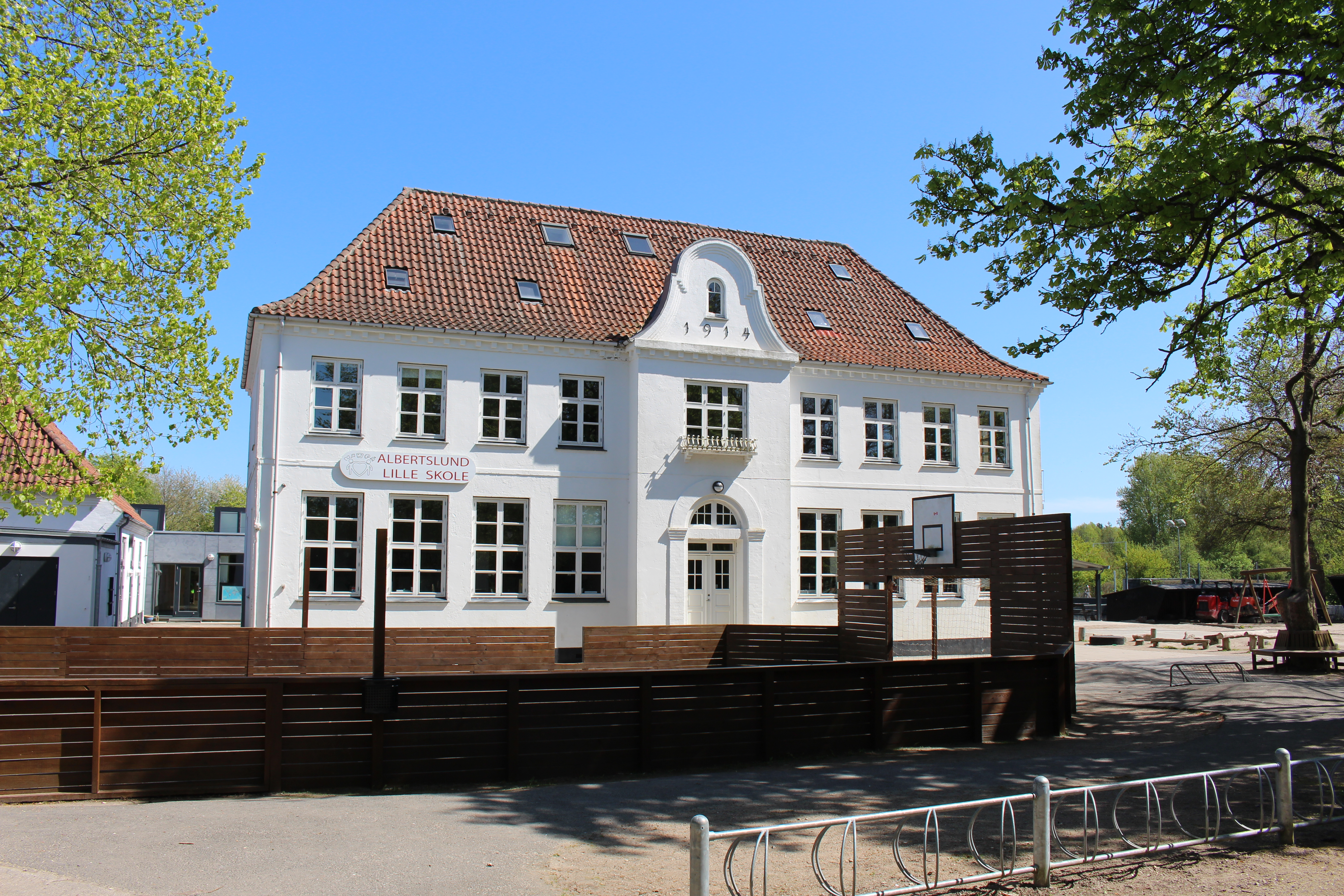 Albertslund Lilleskole